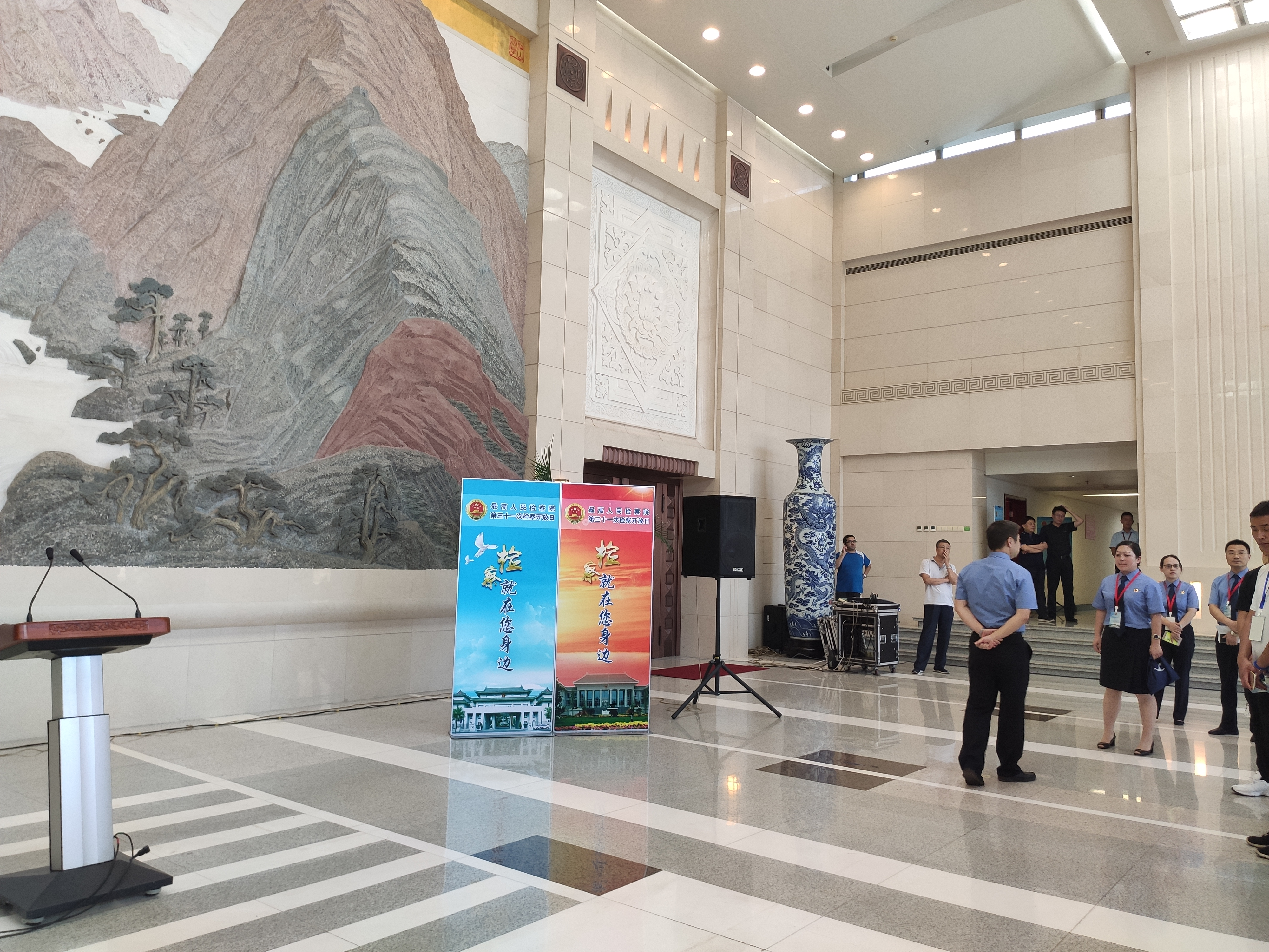 最高人民检察院